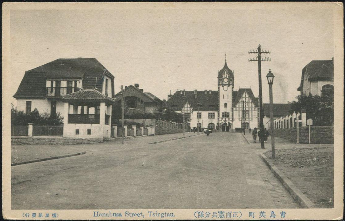 青岛蒙阴路及警察公署旧址旧明信片